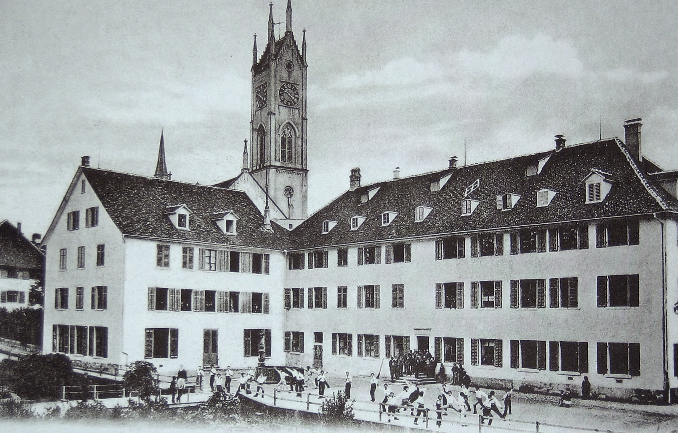 Hof des Seminars Küsnacht um 1905